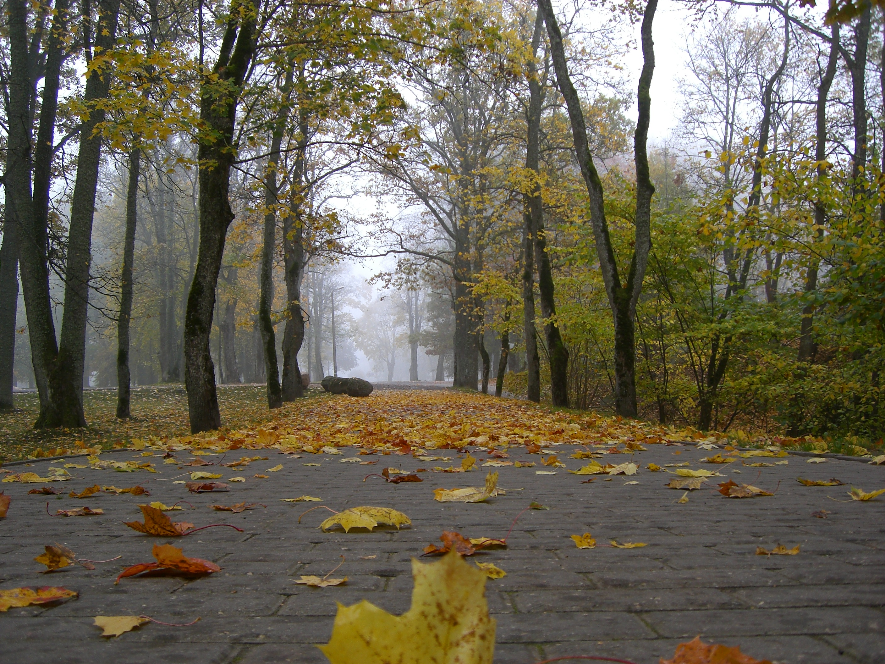 Autum view in Jurmala.